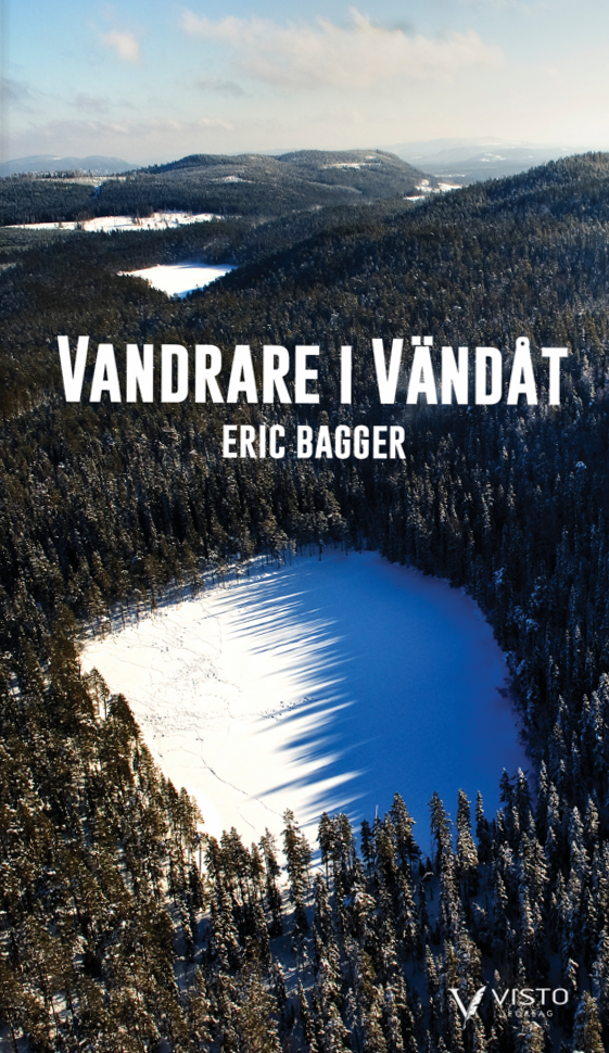 Omslag till romanen "Vandrare i Vändåt